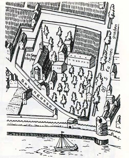 Kloster Sion, Köln 1571 nach Arnold Mercator